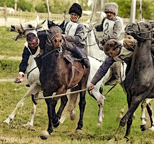 Sekumpulan lelaki menaik kuda bermain polo bernama Chovgan di Azerbaijan